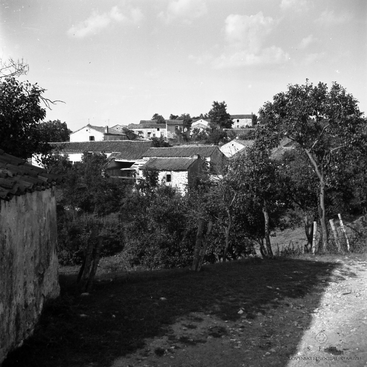 Račice, del vasi.